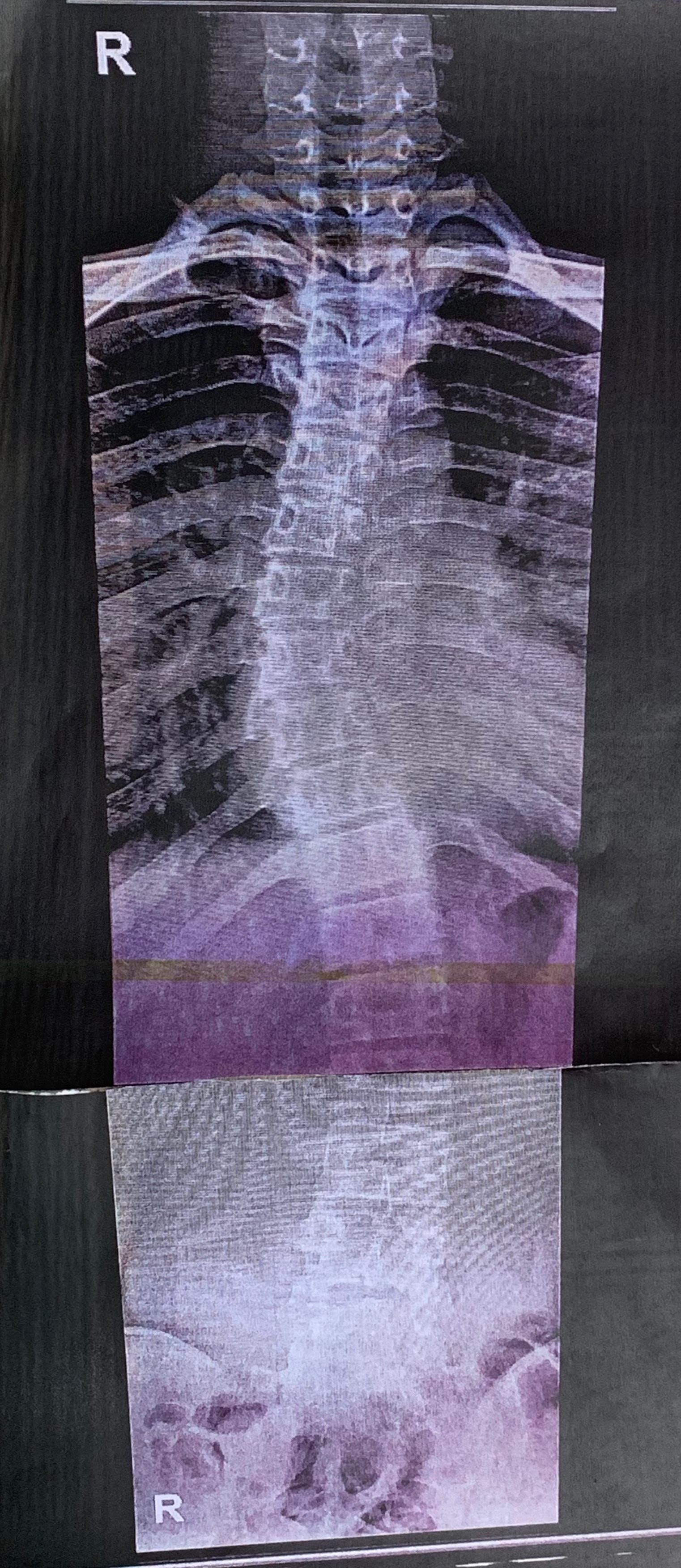 kdm0503의 척추이다. 서 있을 때(중력 영향 o)와 누워 있을 때의 척추 상태(무중력)를 확인 하기 위해 업로드 한 것이다.